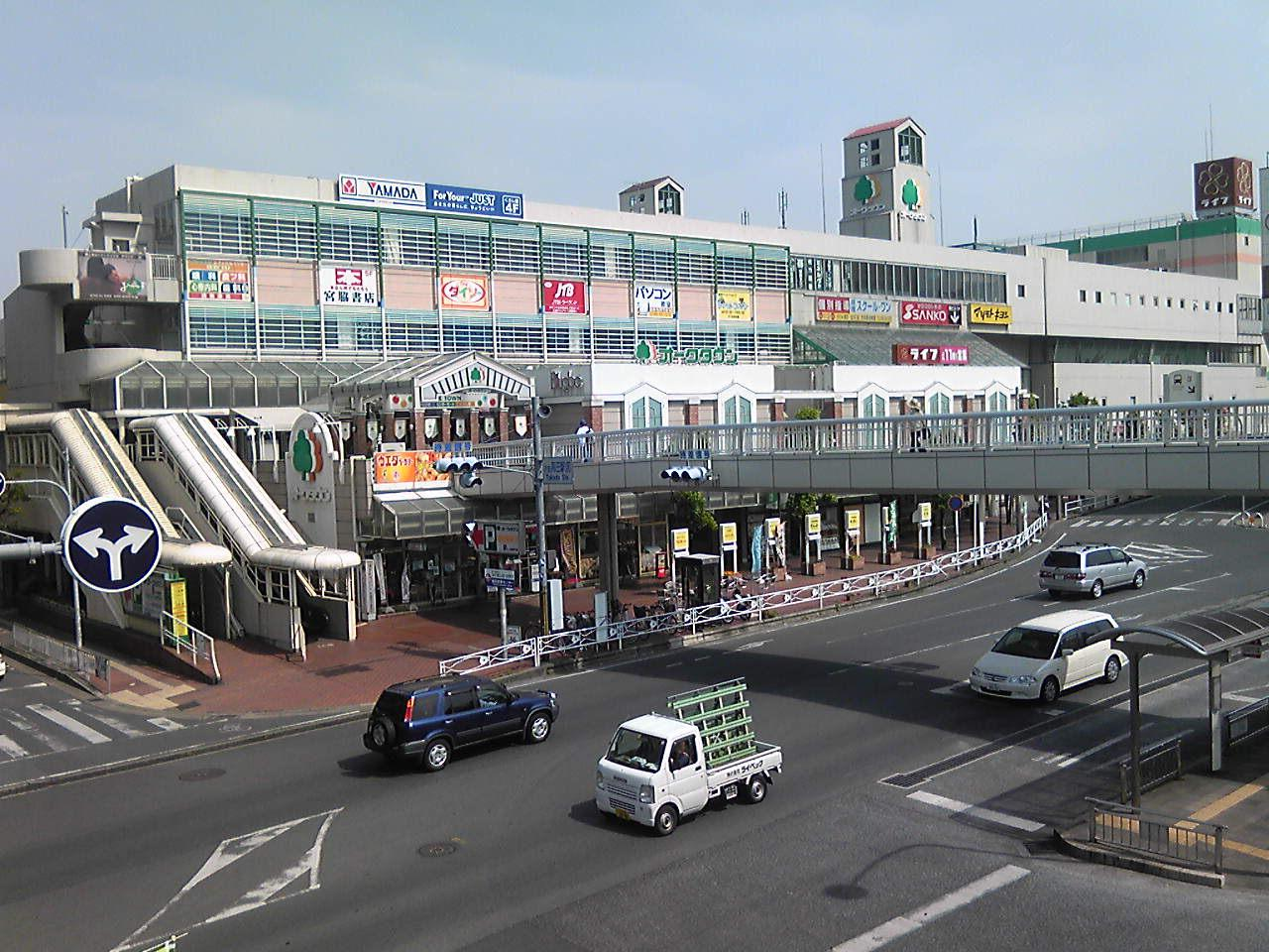 オークタウン大和高田 近鉄大和高田駅前歩道橋から撮影